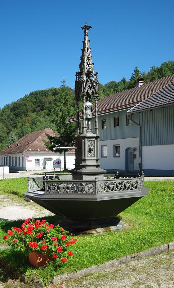 Teisendorfer Str. 61, 83317 Teisendorf (Achthal), zugehöriger BrunnenThis is a photograph of an architectural monument.